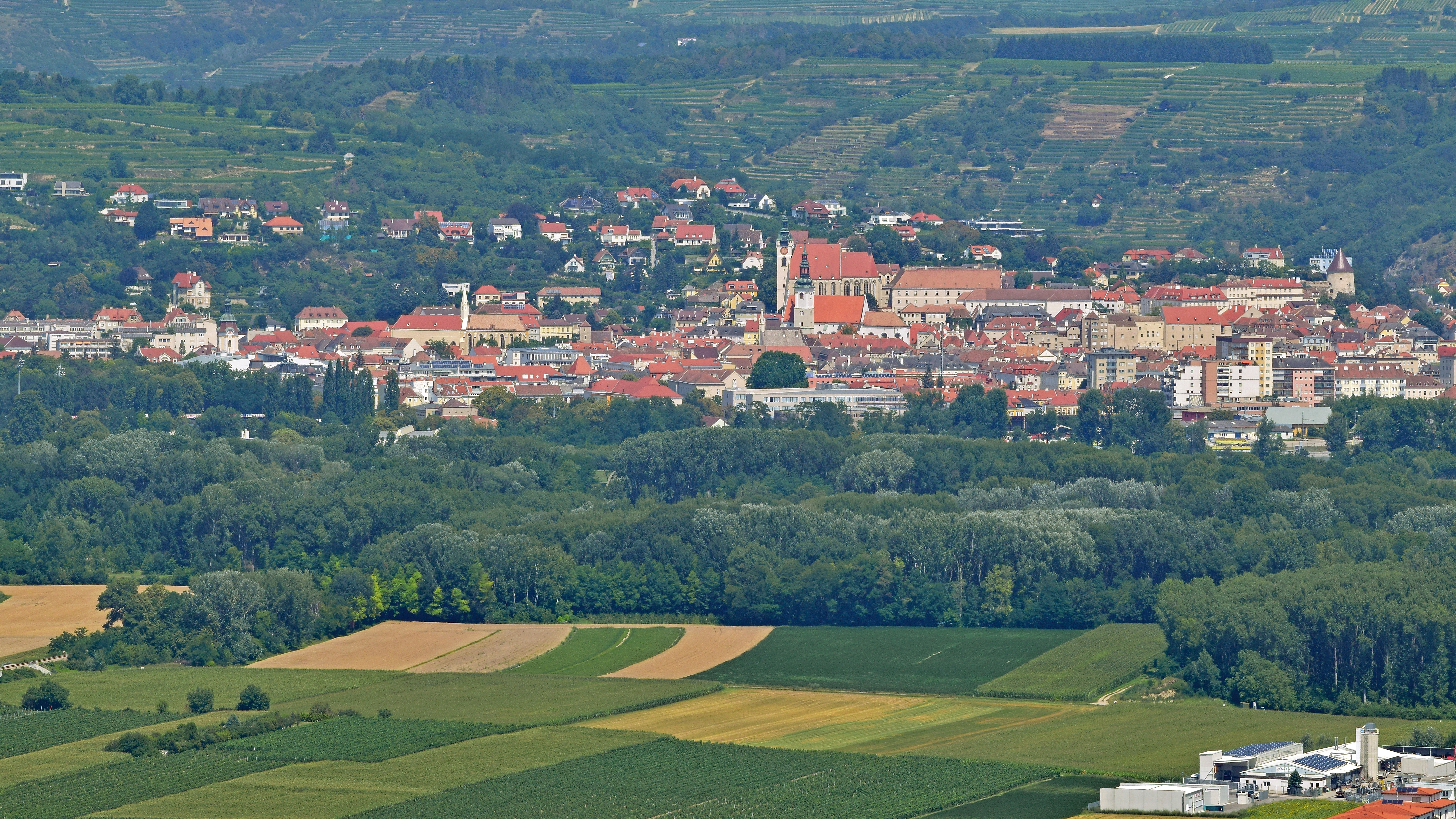 Krems an der Donau, aufgenommen vom Stift Göttweig.